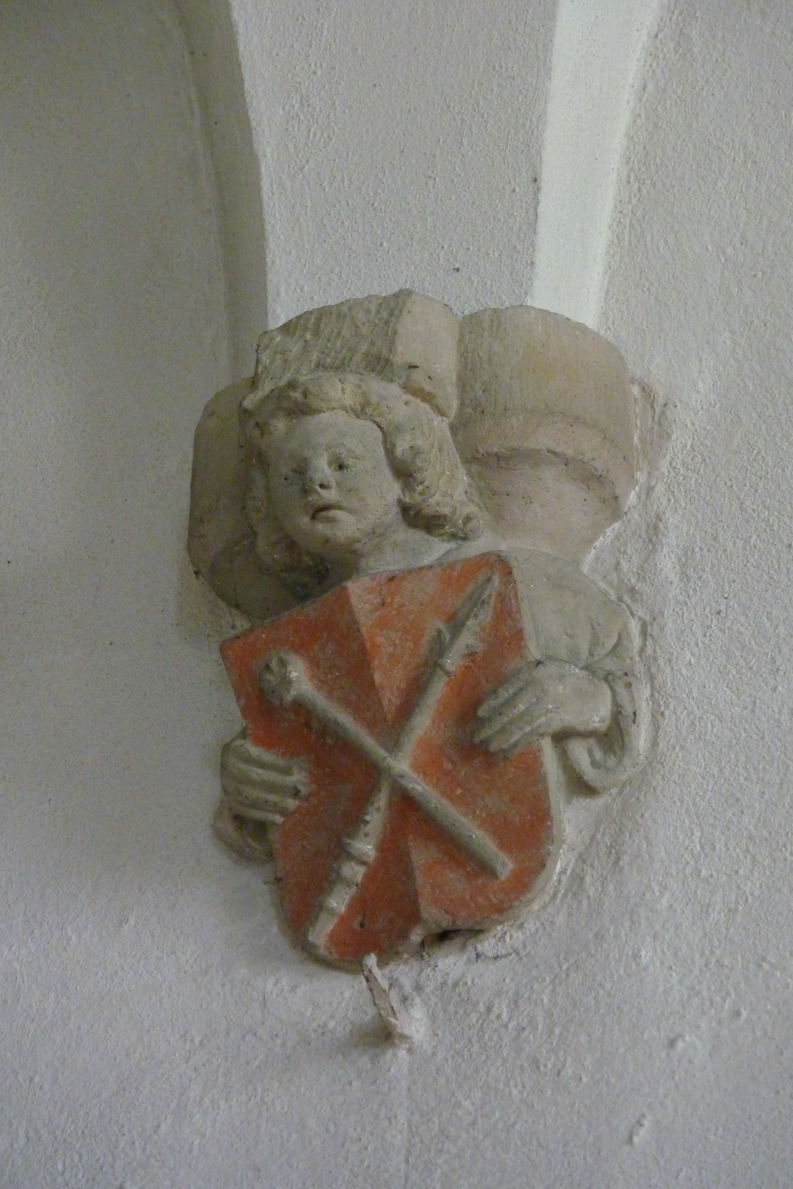 katholische Stadtpfarrkirche St. Peter und Paul in Grünsfeld im Main-Tauber-Kreis (Baden-Württemberg), Hauptstraße 18